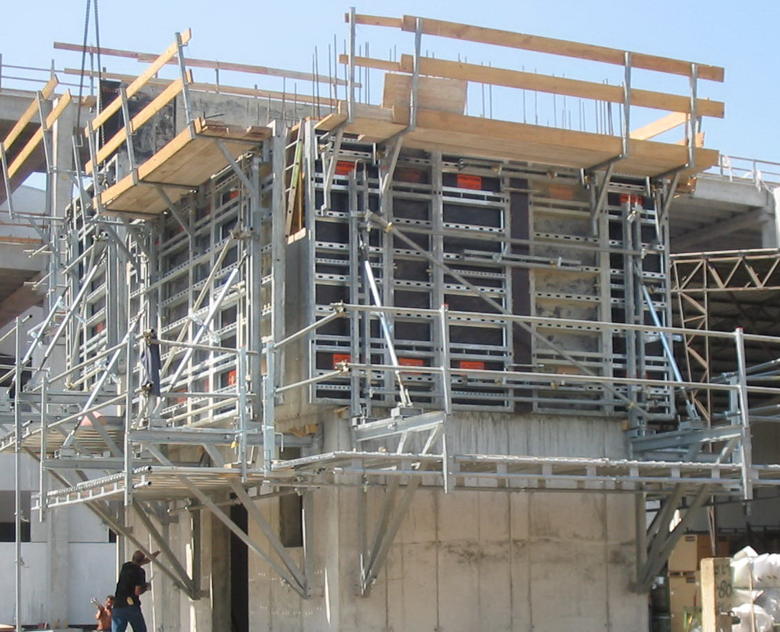 Tipo di cassaforma rampante